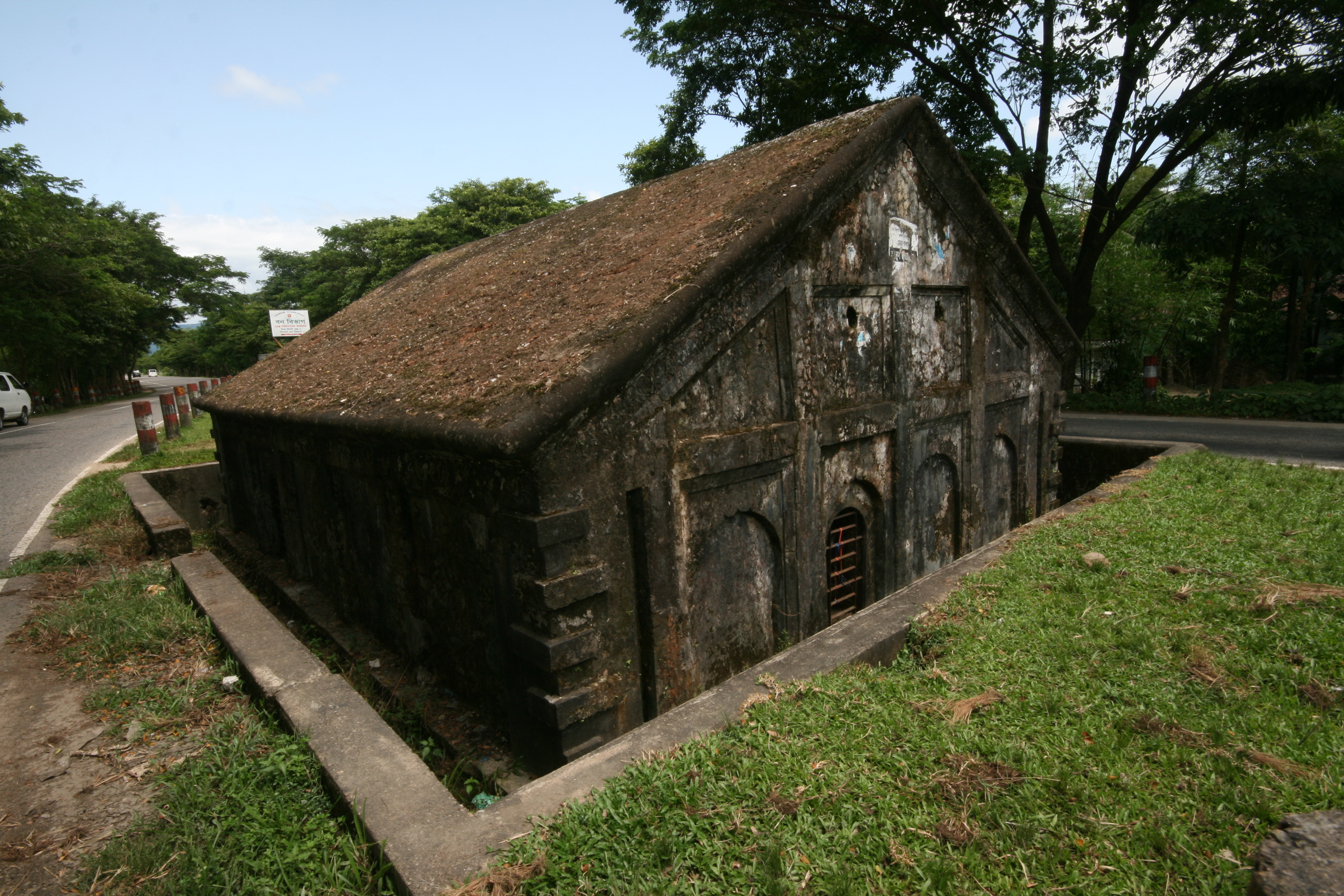 ইরাবতী পান্থশালা